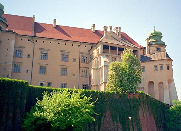 Krakow (Poland) Wawel